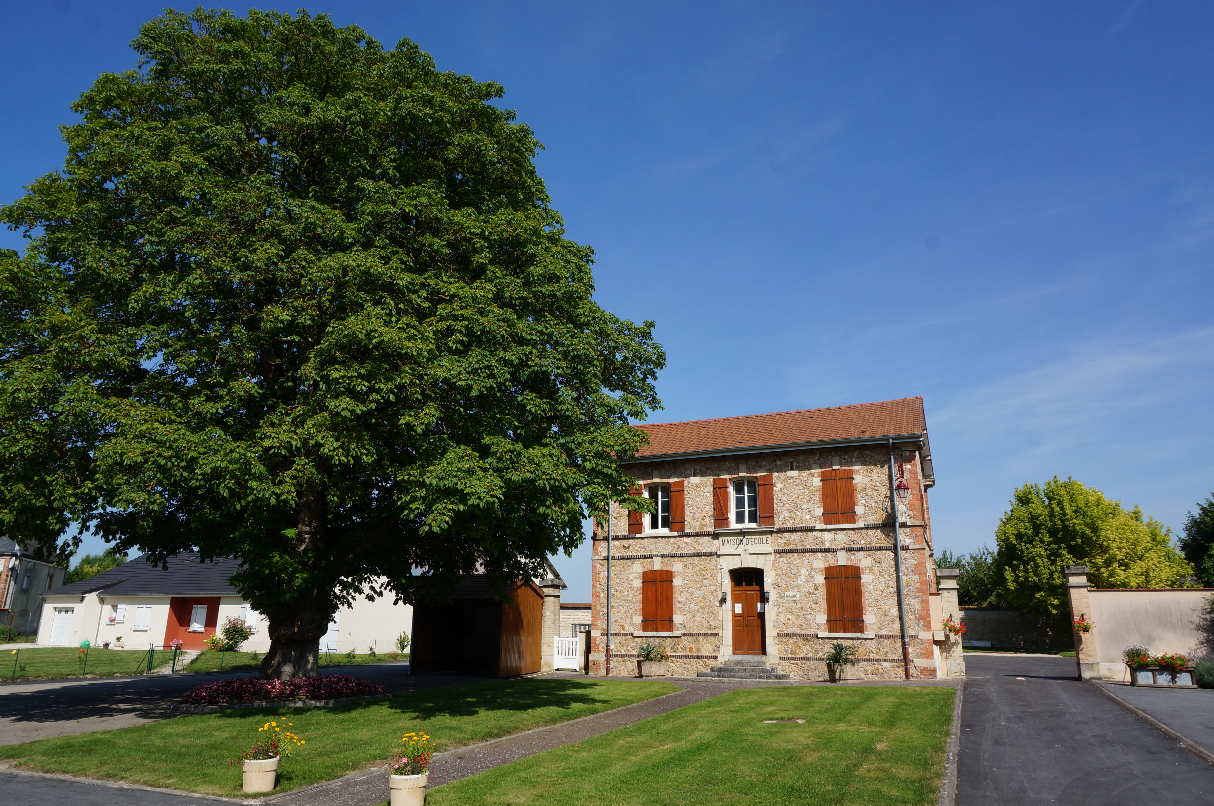 airie_d'Isse.